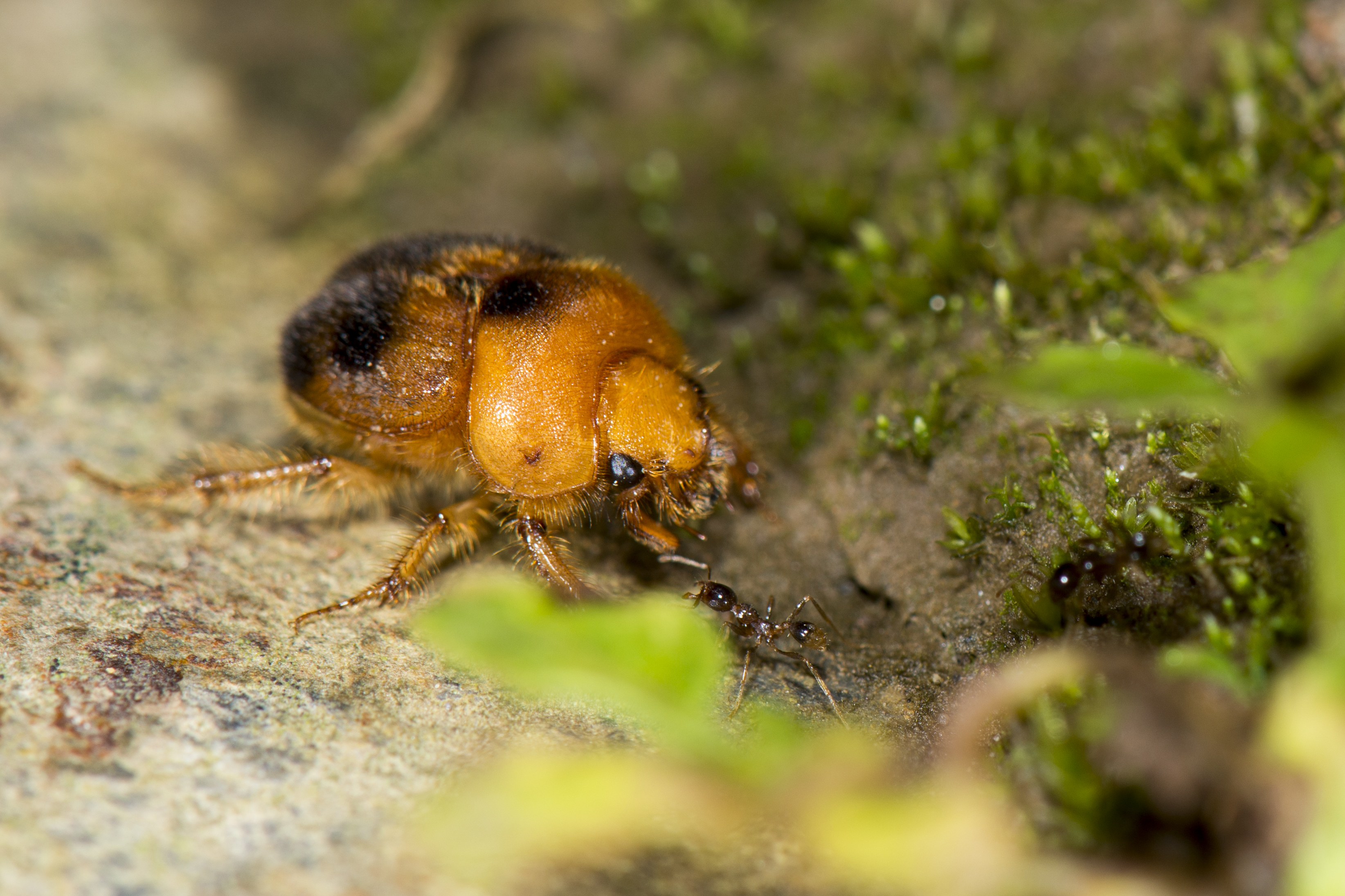 Nothochodaeus sakaii (Ochi, Masumoto & Li, 2006) 酒井紅金龜